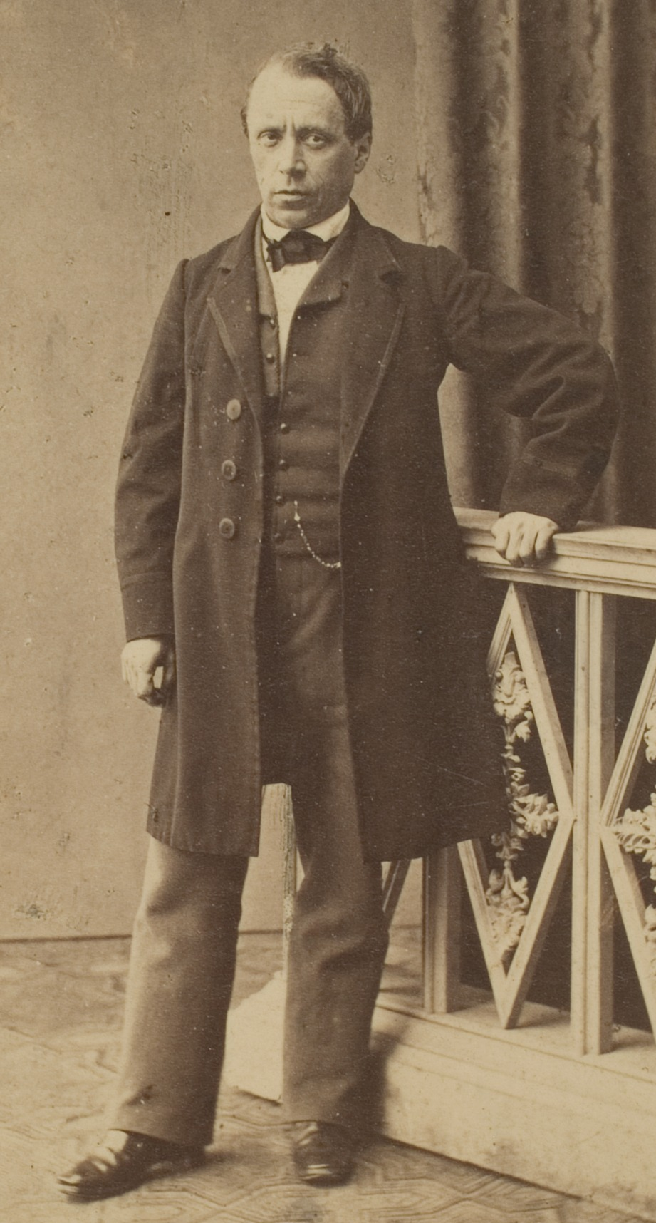 Gustav Alfons von Leonhard, Geologe und Mineraloge, 1857–1878 Professor in Heidelberg